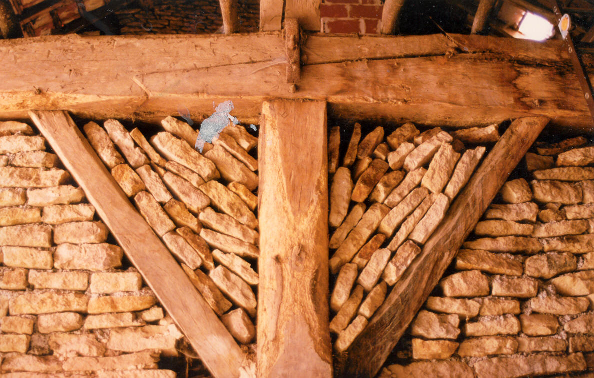 Entrait à assemblage en trait de jupiter, Montsaon